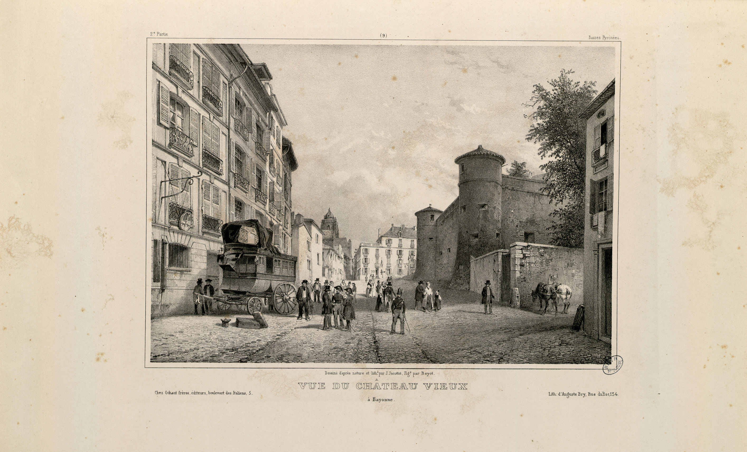 Fait partie de la deuxième partie du recueil "Souvenirs des Pyrénées". Titre lithographié et 51 lithographies. Sur la couverture, l'adresse du lithographe est différente de celle de la page de titre : rue du Bac, 134. Les personnages qui animent les vues ont été dessinés par A. Bayot. Le lithographe de cette deuxième partie est Auguste Bry. L'ouvrage de Jacottet est très rare quand il est complet des deux parties. Vignette lithographiée au titre : "La Roche du Limaçon. Route de Cauterets" Ancely, René (1876 - 1966). Possesseur